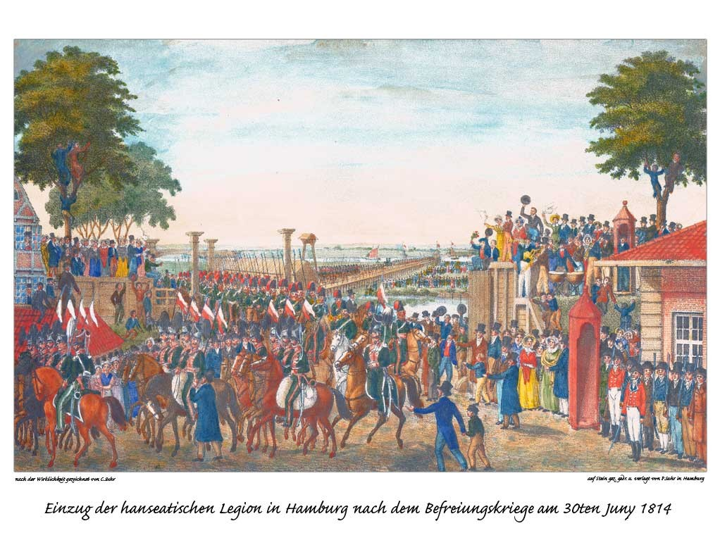 Einzug der Hanseatischen Legion in Hamburg 1814